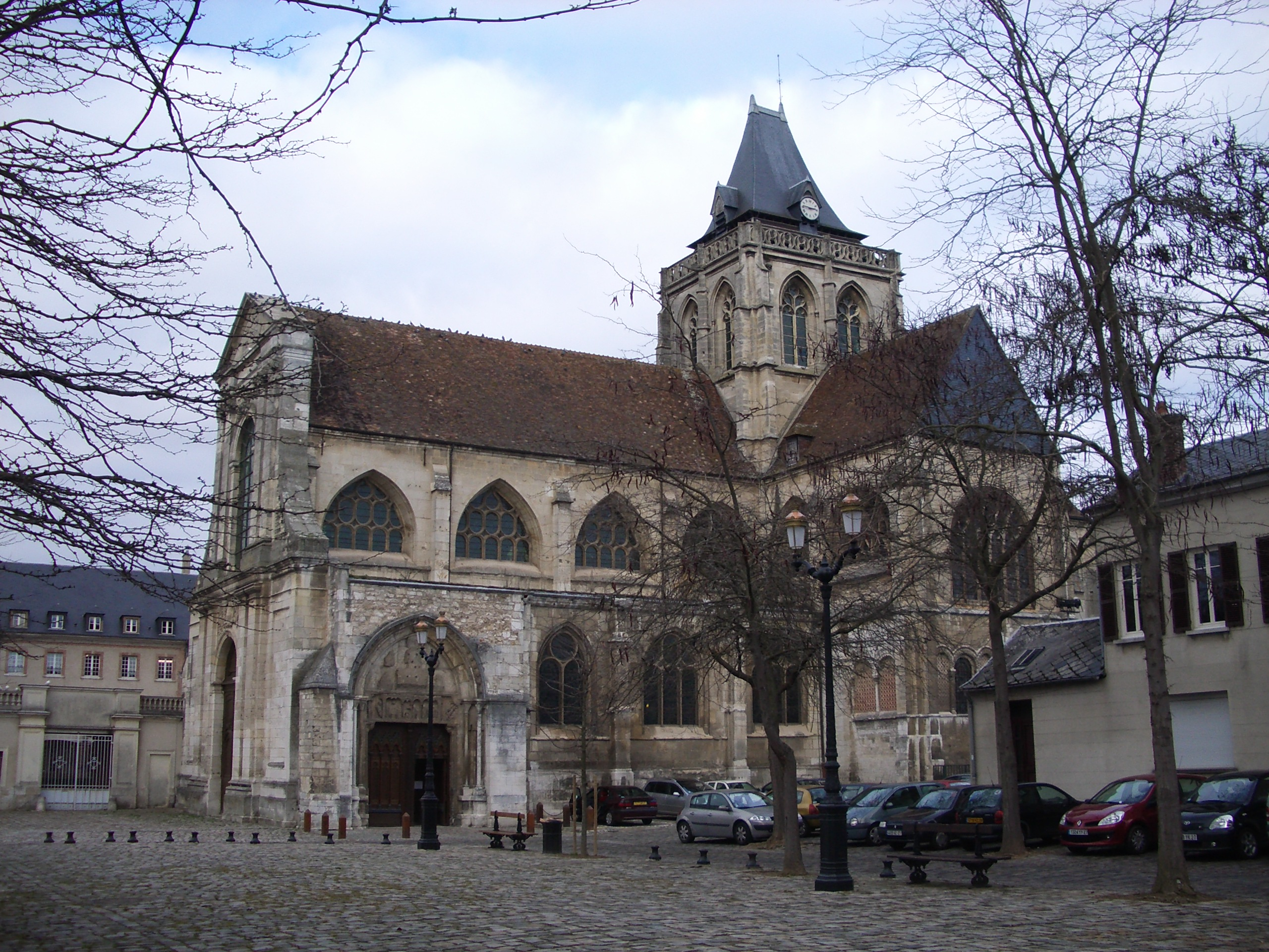 L'église Saint-Taurin, à Évreux - France - La place Saint-Taurin est un site classé en 1937, qui a survécu à la Seconde Guerre Mondiale.